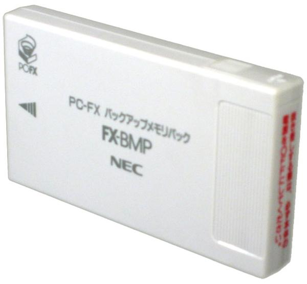 NECホームエレクトロニクス、PC-FX BackupMemoryPack